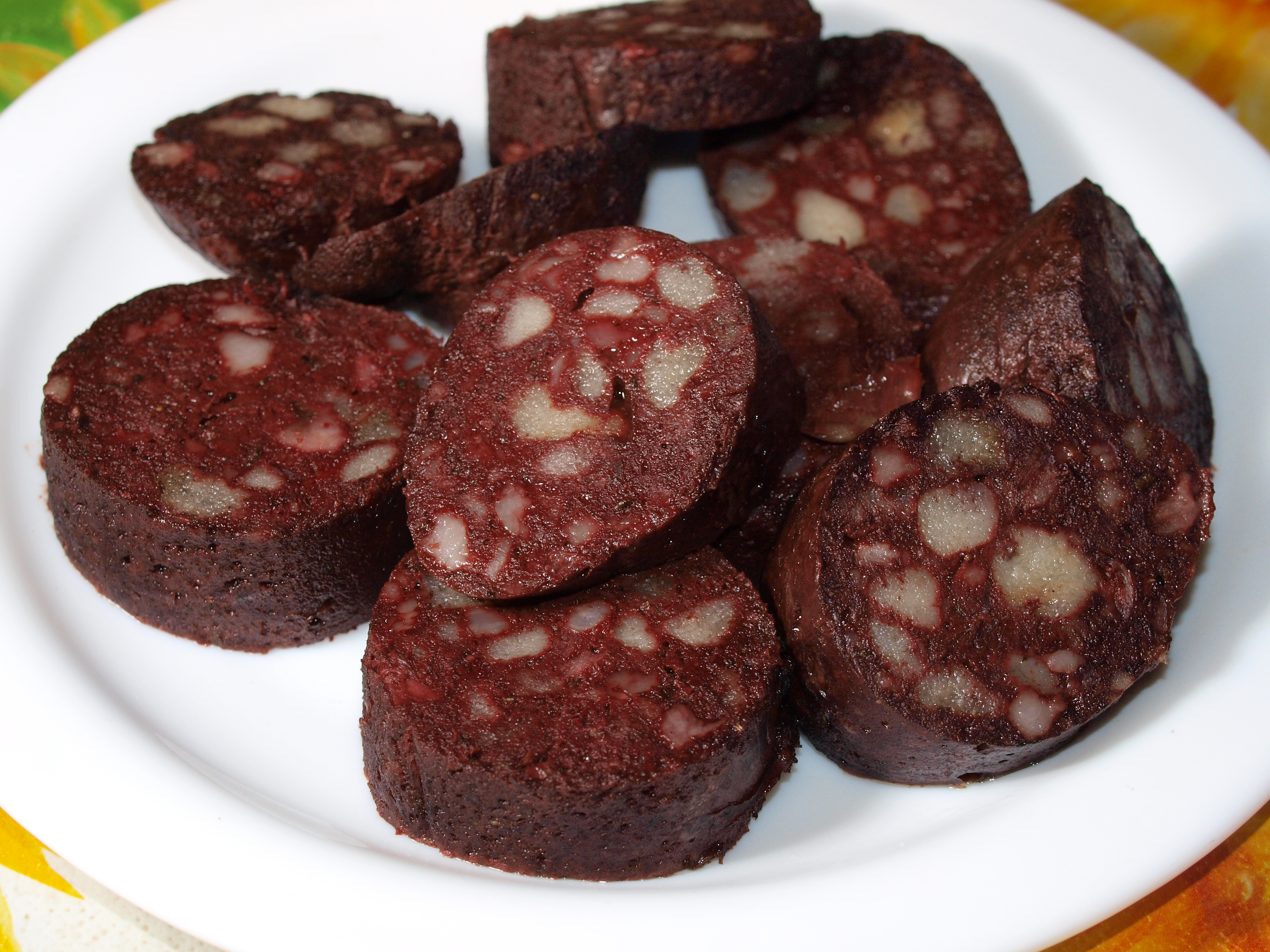 Boudin du Sud-Ouest ou boudin à la viande dit blutwurst en Allemagne